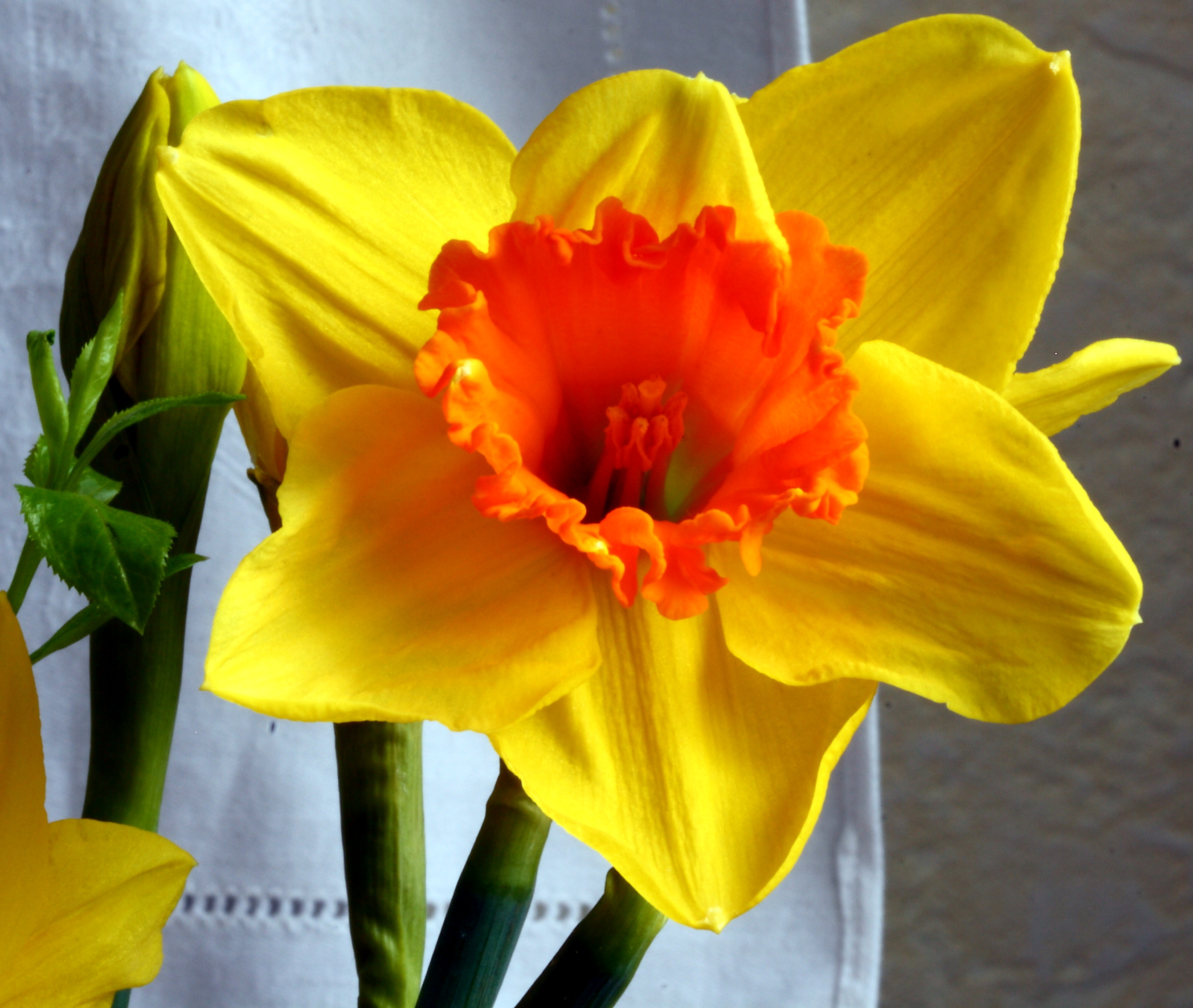 Narzisse